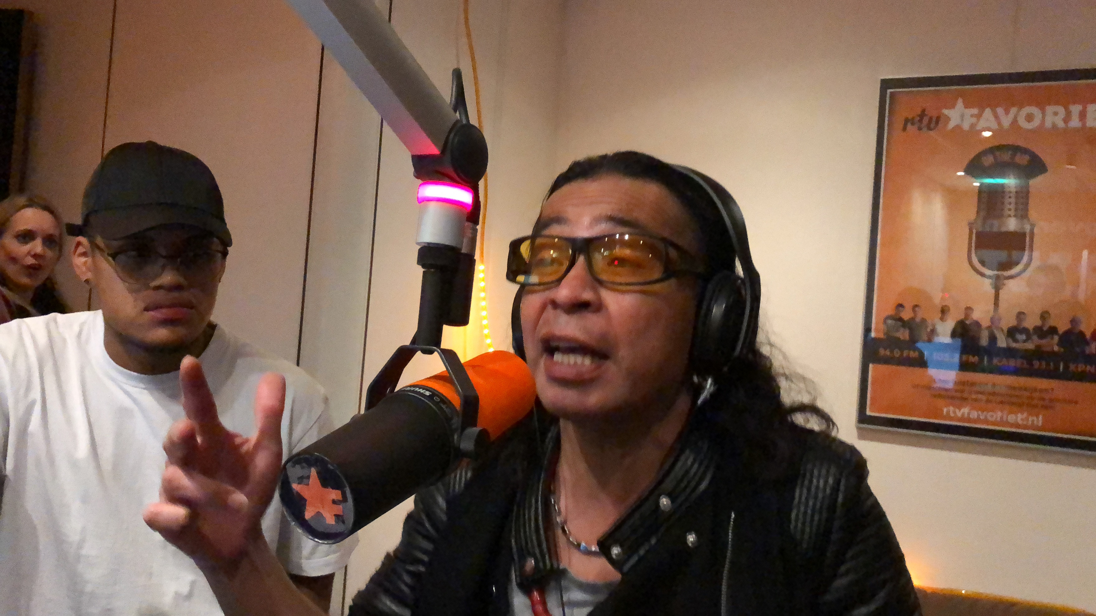 Tony Scott tijdens de 90’s Night op Favoriet FM.